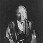 сосоздательница оомто-кё ДЭГУТИ Нао